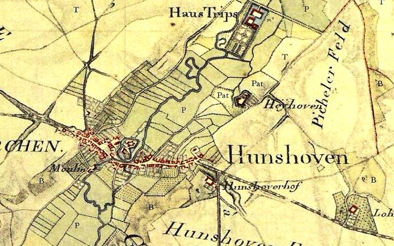 Kartenaufnahme der Rheinlande 1803-1820